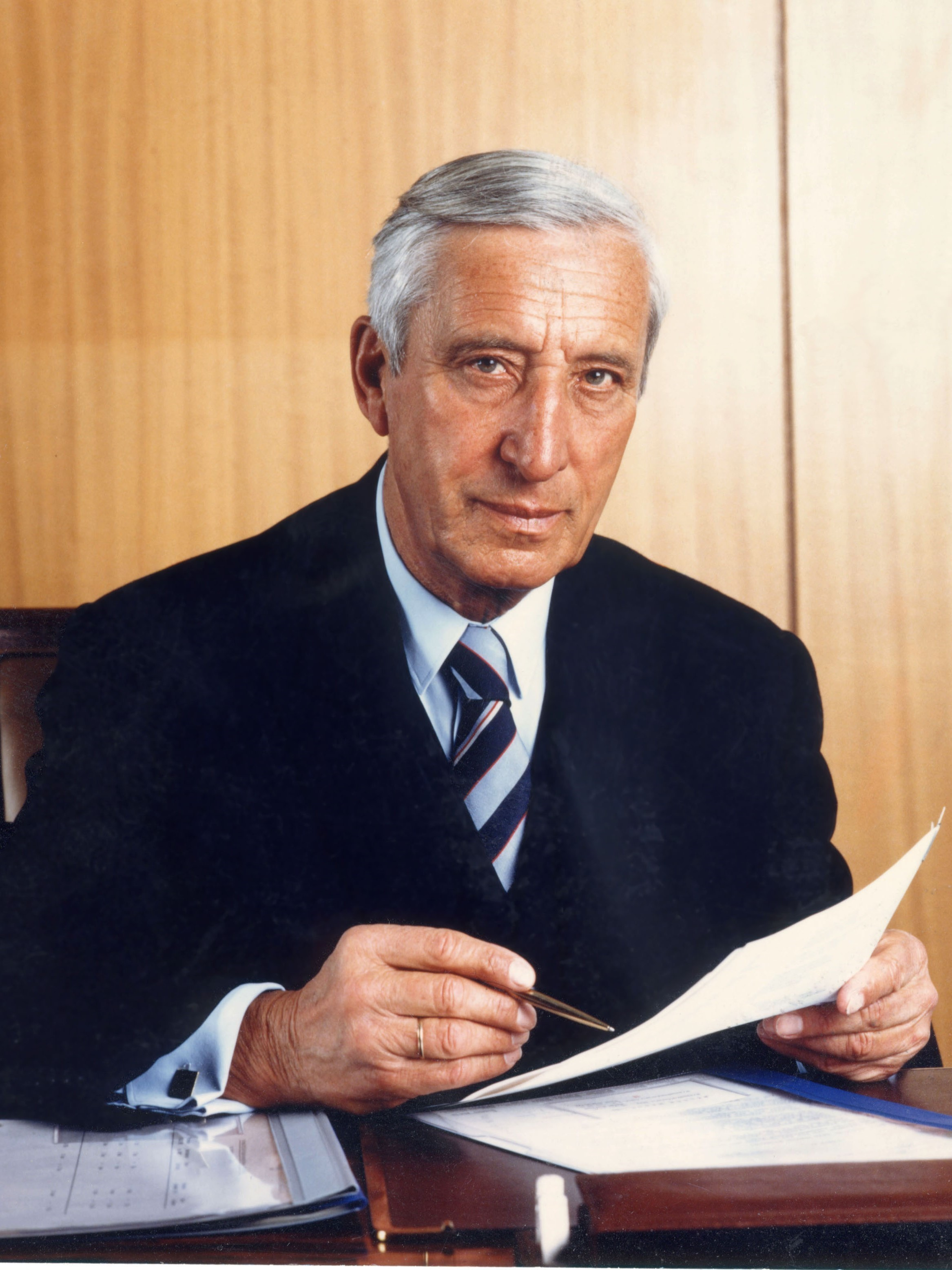 Foto von Walter Aichinger, geb. 26.08.1916